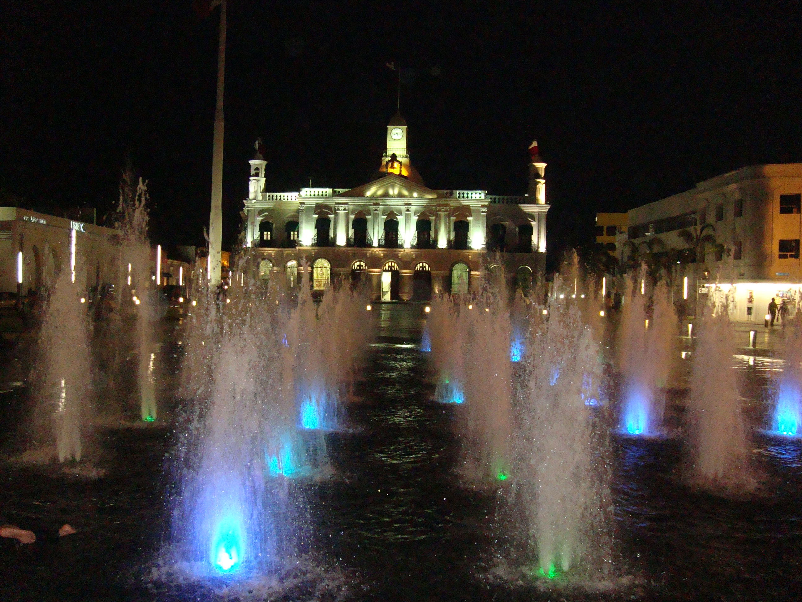 Plaza de Armas de la ciudad de Villahermosa, durante la noche. En primer lugar se muestran las fuentes "danzantes" y al fondo se aprecia el Palacio de Gobierno. Villahermosa, Tabasco, México.